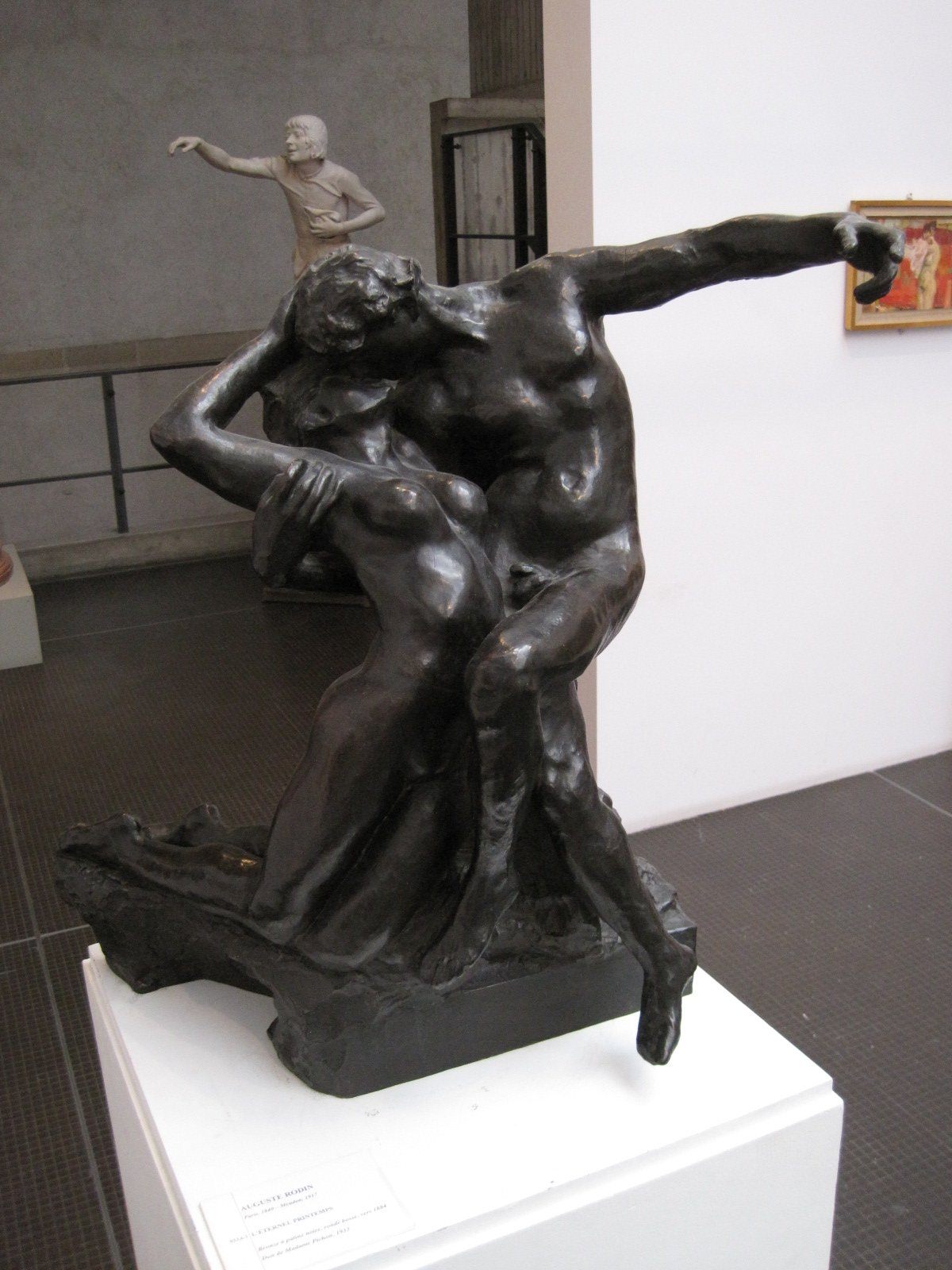 L’éternel printemps - Bronze à patine noire - Vers 1884 - par Auguste Rodin - Musée des Beaux-Arts de Besançon